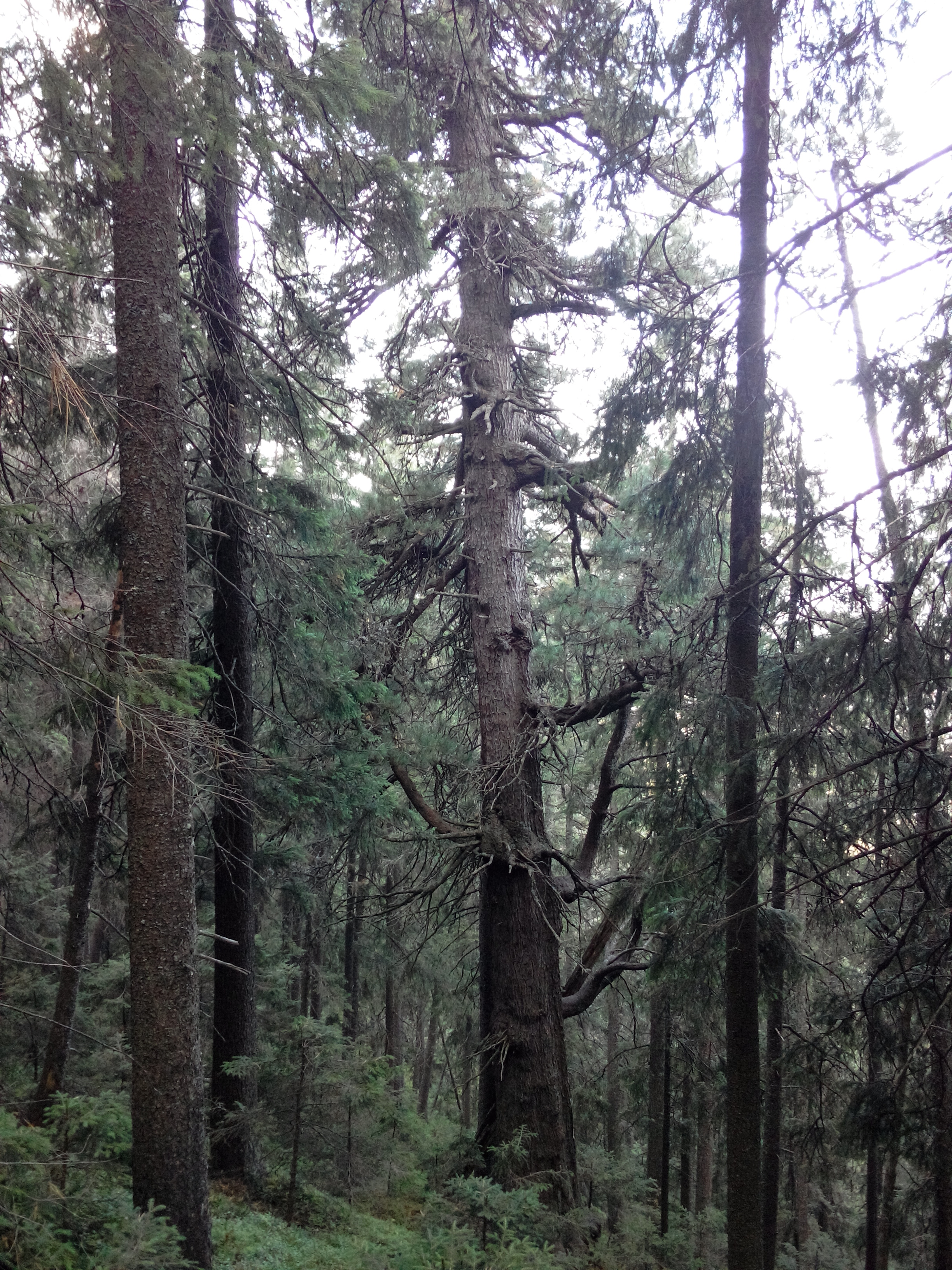 Один з найстаріших кедрів, діаметр 98 см. Вік ― орієнтовно 500 років